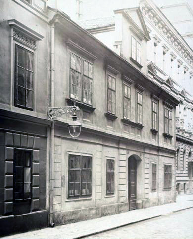 Wien: Mariannengasse 22, um 1904